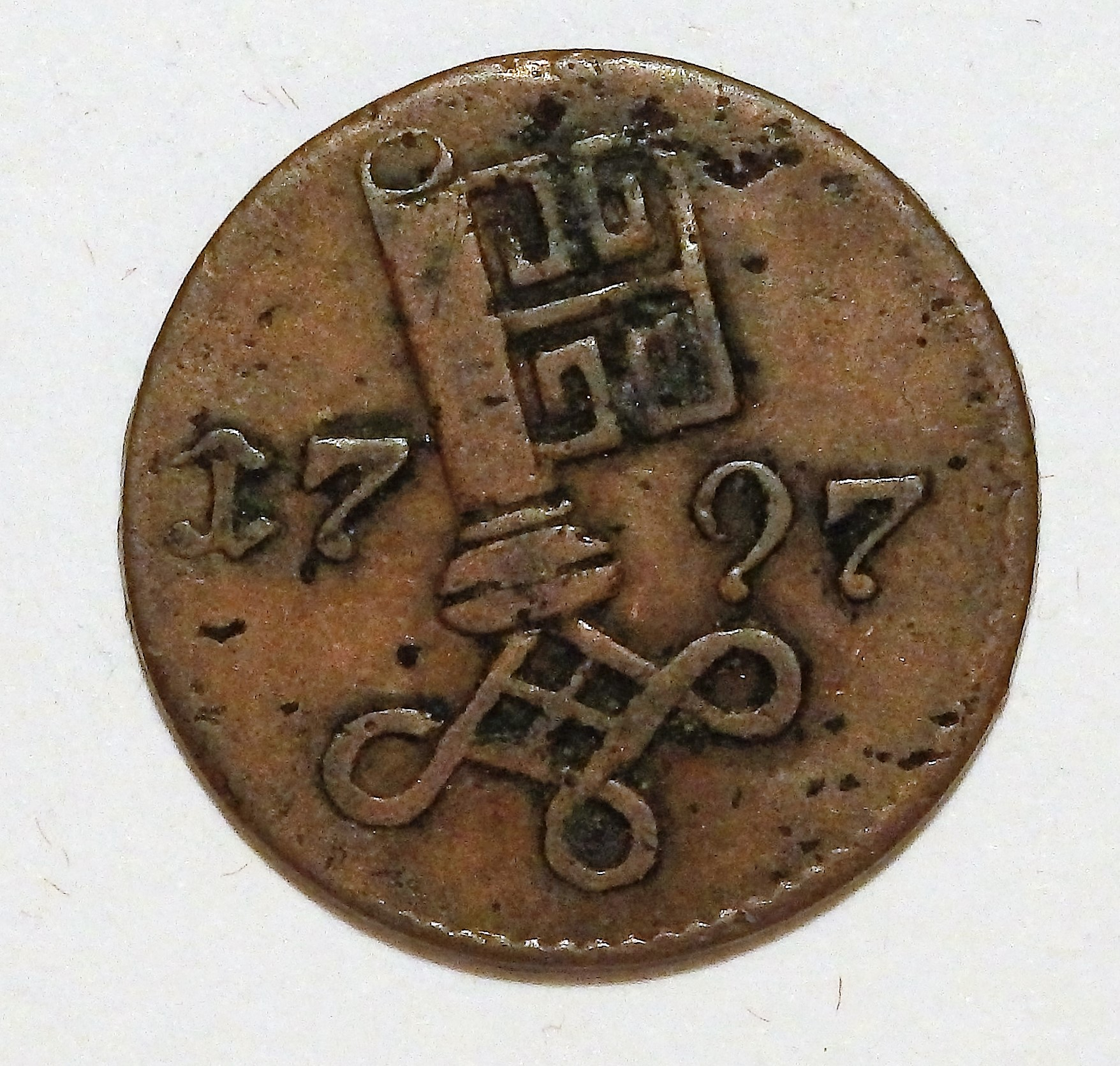 Rückseite des Schwarens, G. Schön, Deutscher Münzkatalog Nr. 6